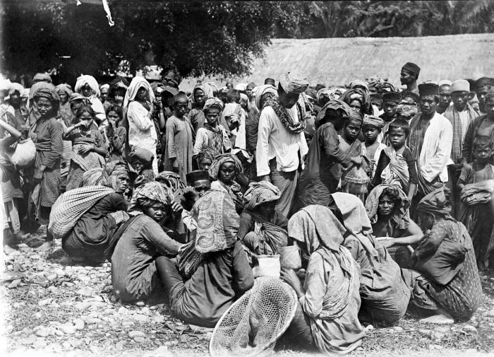 Repronegatief. Markt te Siboehoean, Tapanoeli, Sumatra